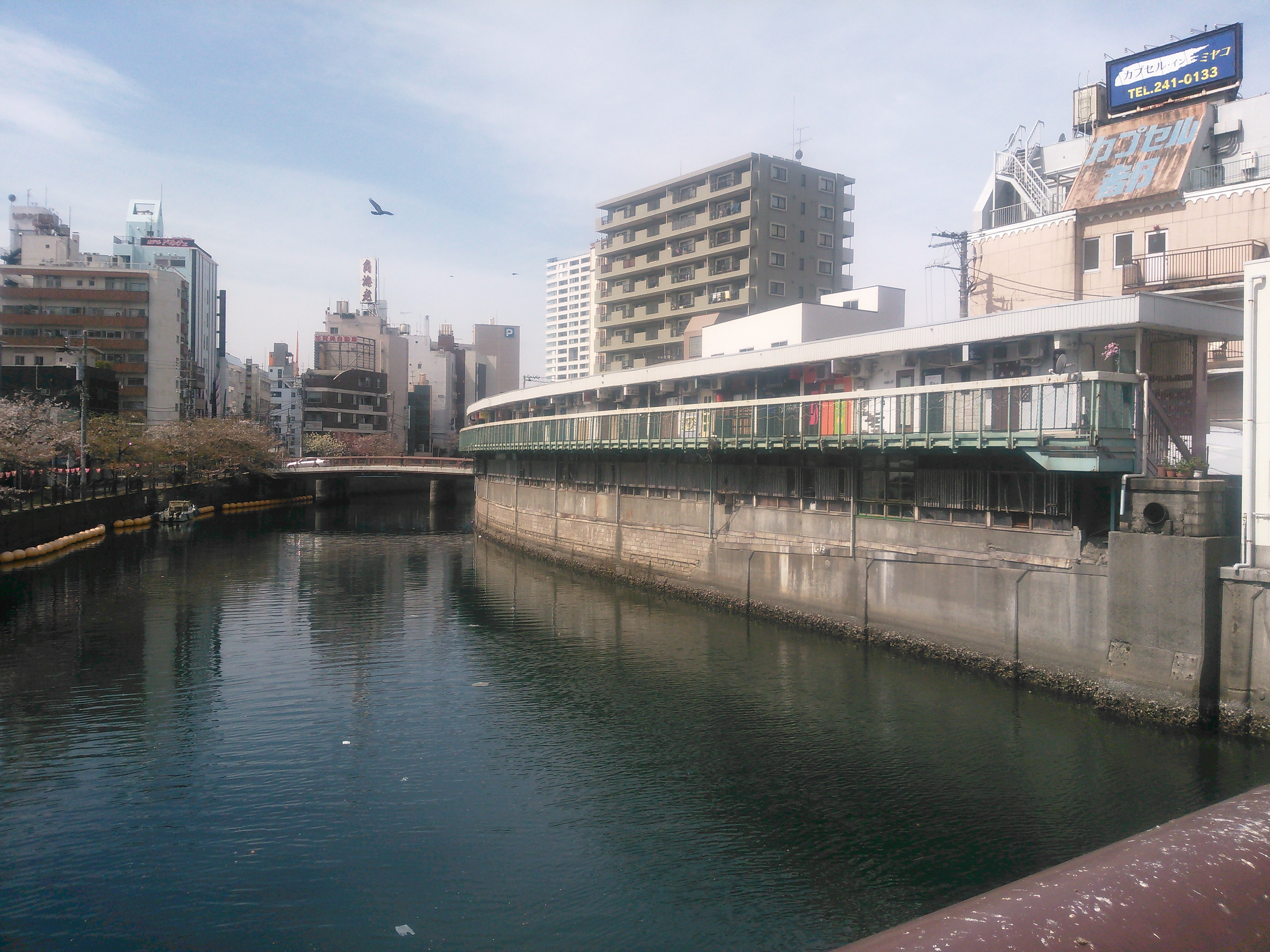 横浜市中区野毛町、大岡川沿いにある都橋商店街。奥の橋は宮川橋。